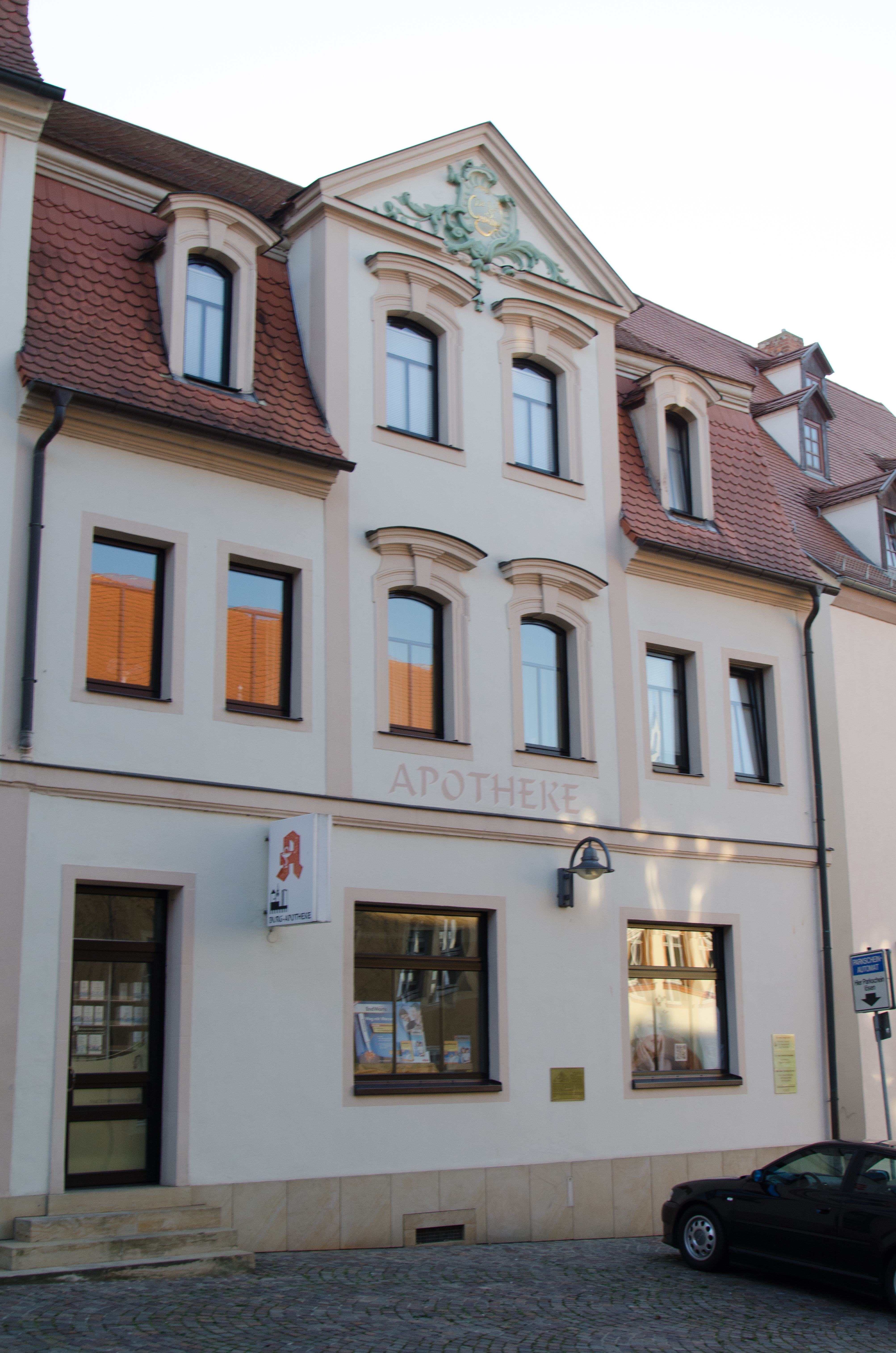 Querfurt, Nebraer Straße 2